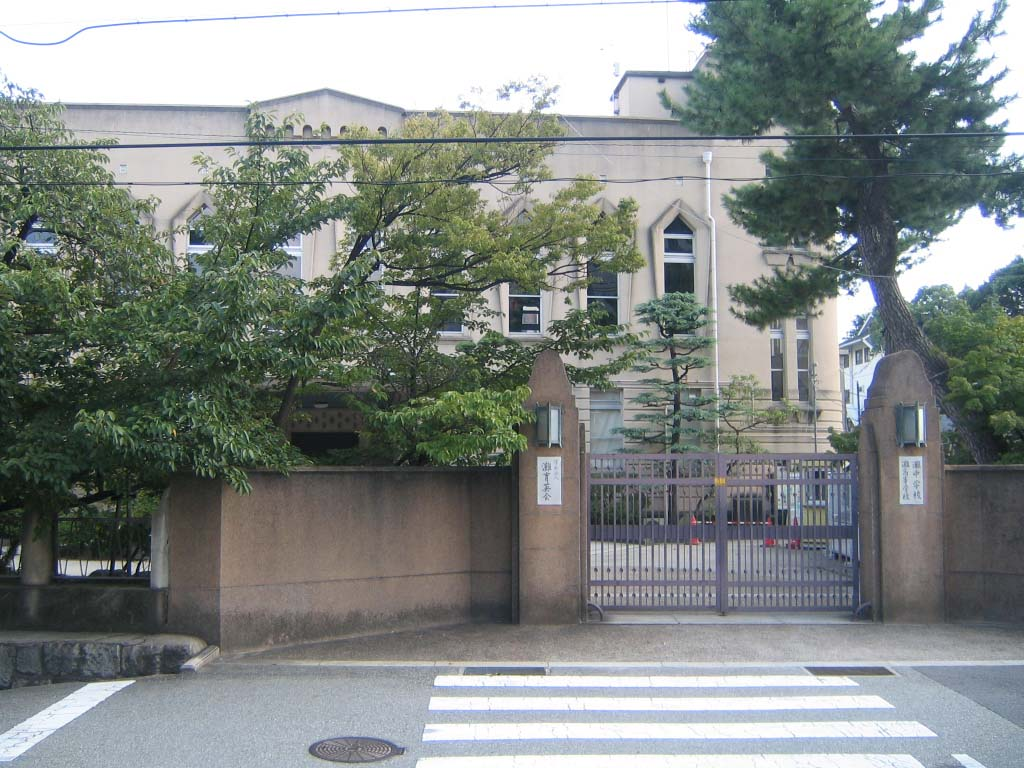 灘中学校・高等学校。兵庫県神戸市東灘区魚崎北町８丁目５番１号